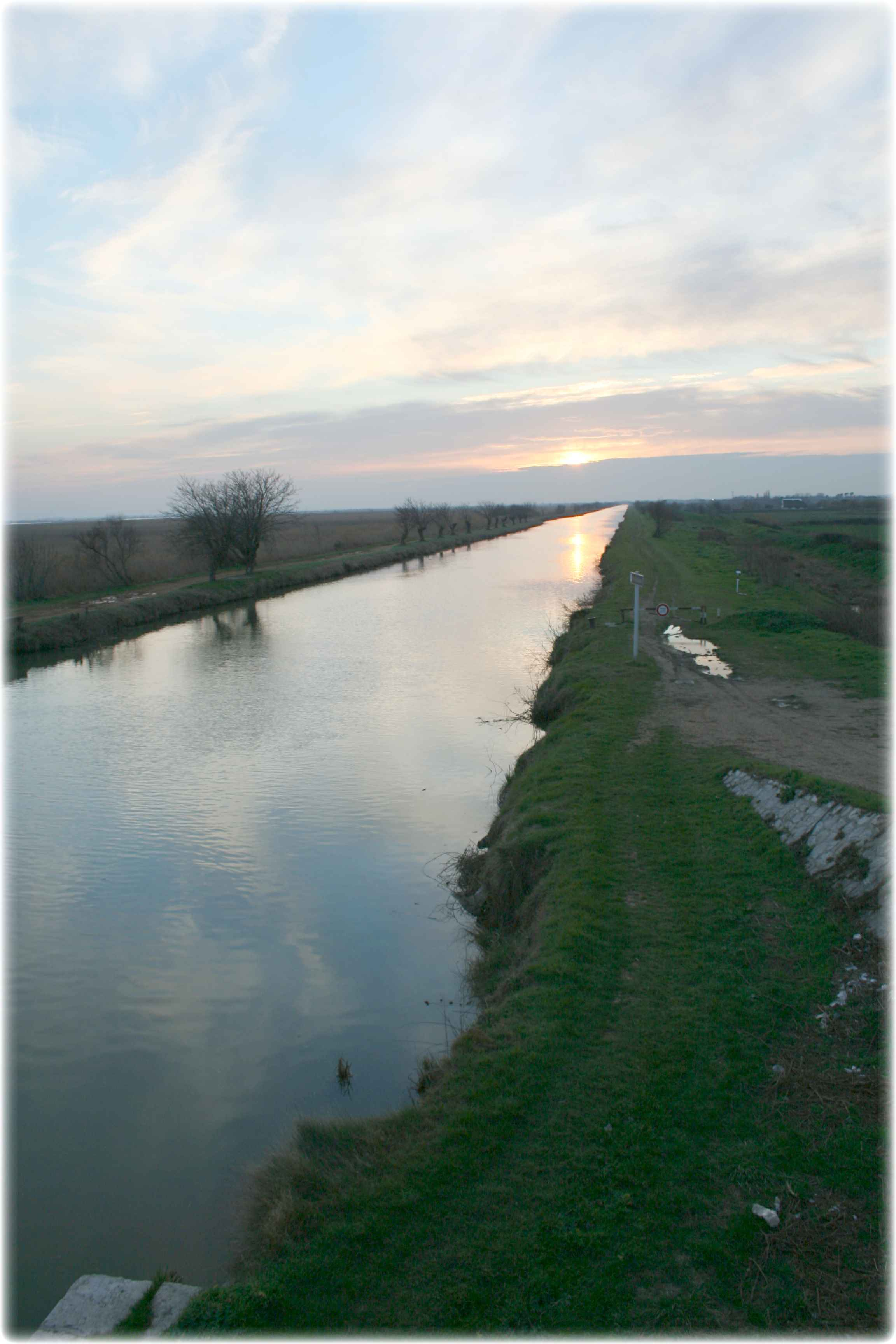 Franquevaux - Canal du Rhone à Sète Auteur: R. BENEZET Date : 21 02 2007